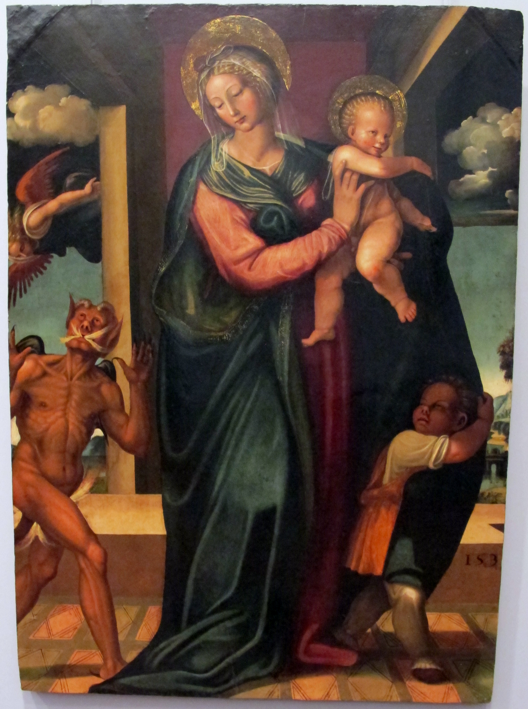 Galleria Napoletana (Museo di Capodimonte)